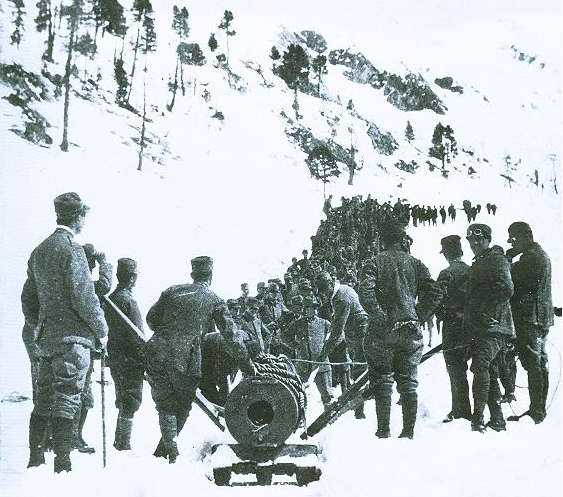 Il la canna del cannone 149/23 viene trainata sull'Adamello